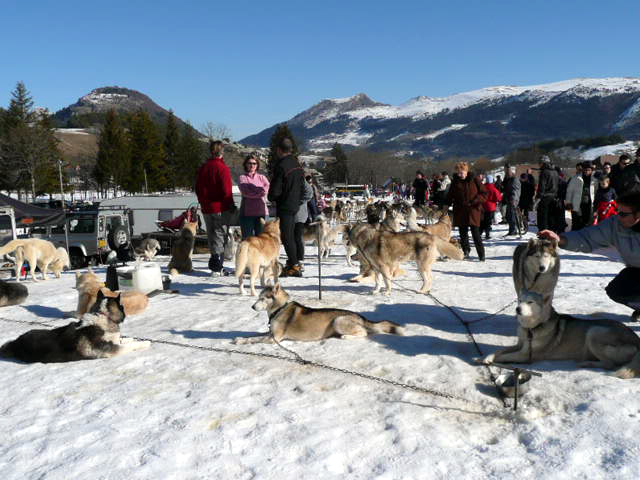 Gresse-en-Vercors (Isère, France) - Chiens d'attelage lors d'une animation à la station. A l'horizon, les pentes dominant le Village.